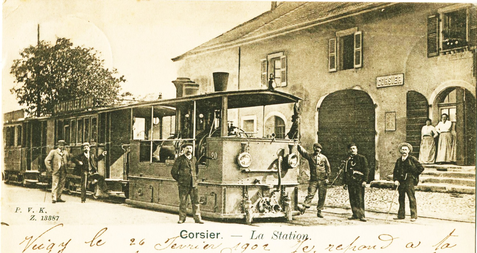 Photo: collection OBERSON Tram à vapeur dans le village de Corsier en route pour Hermance vers 1900.